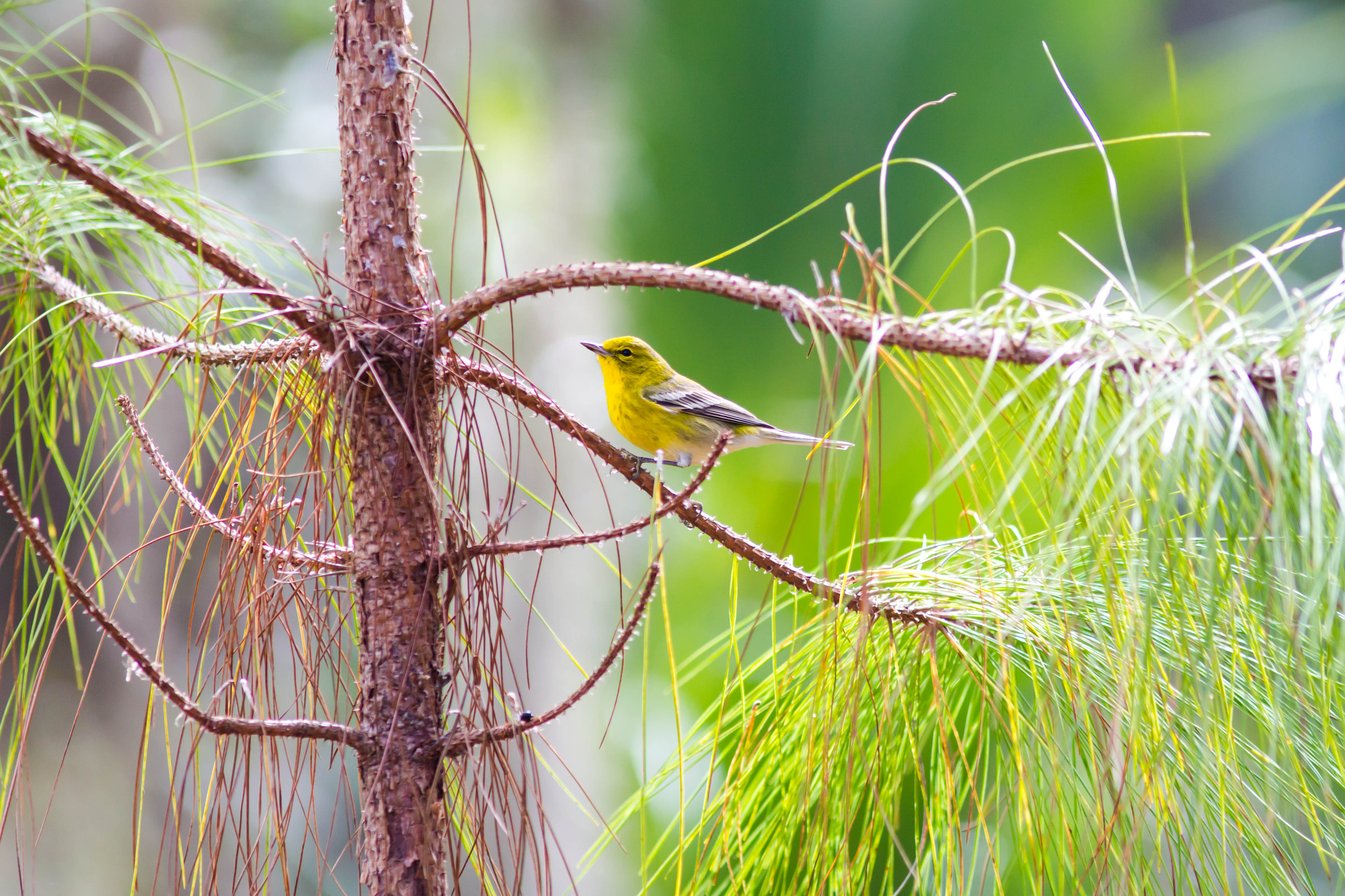 Pine warbler